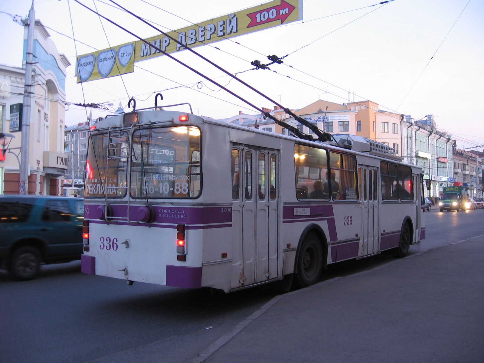 AKSM-101 made in Minsk, Belorussia in 1997. Photo taken in Tomsk, Russia.